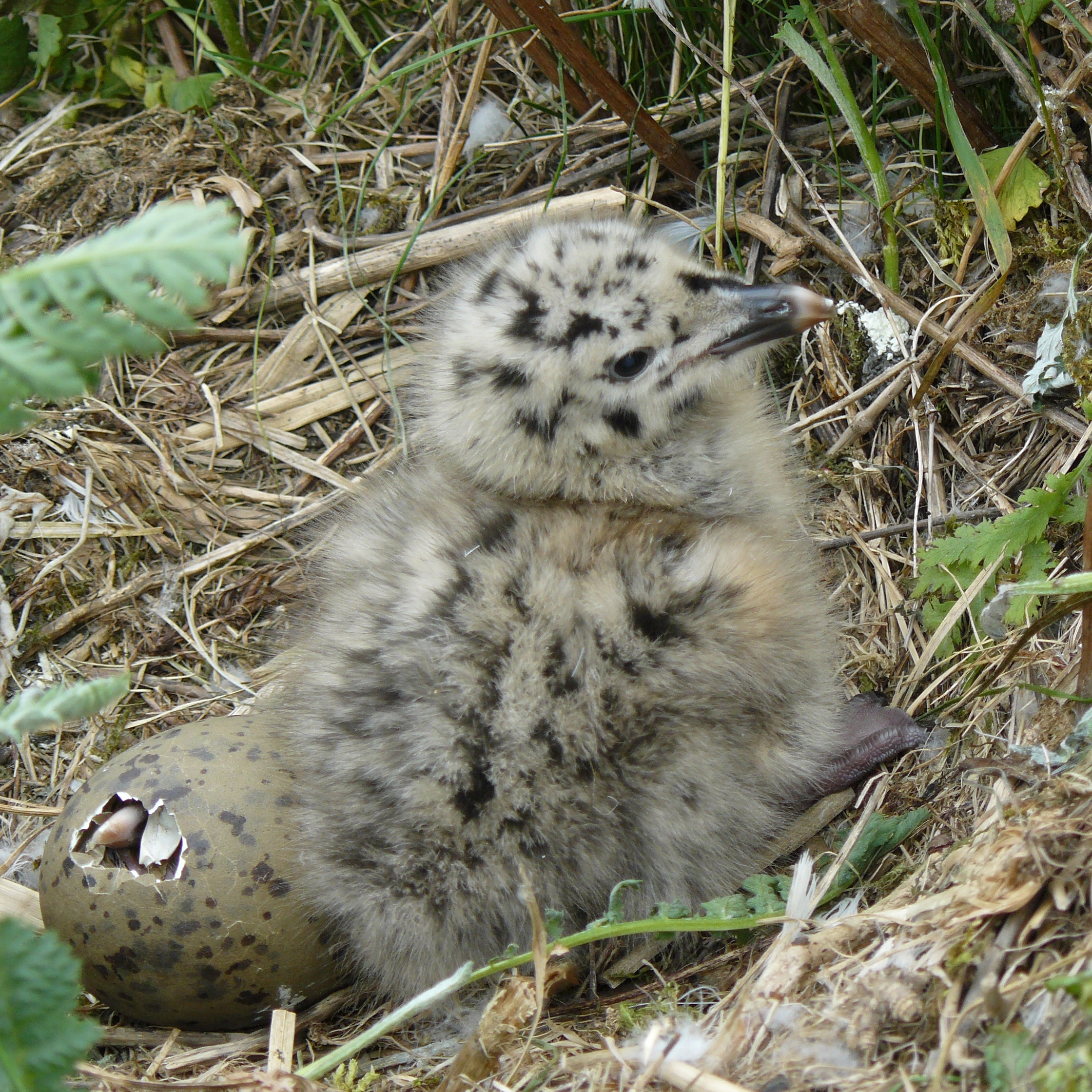 Gelege Sturmmöwe (Larus canus), erstes Küken geschlüpft, zweites Küken schlüpfend